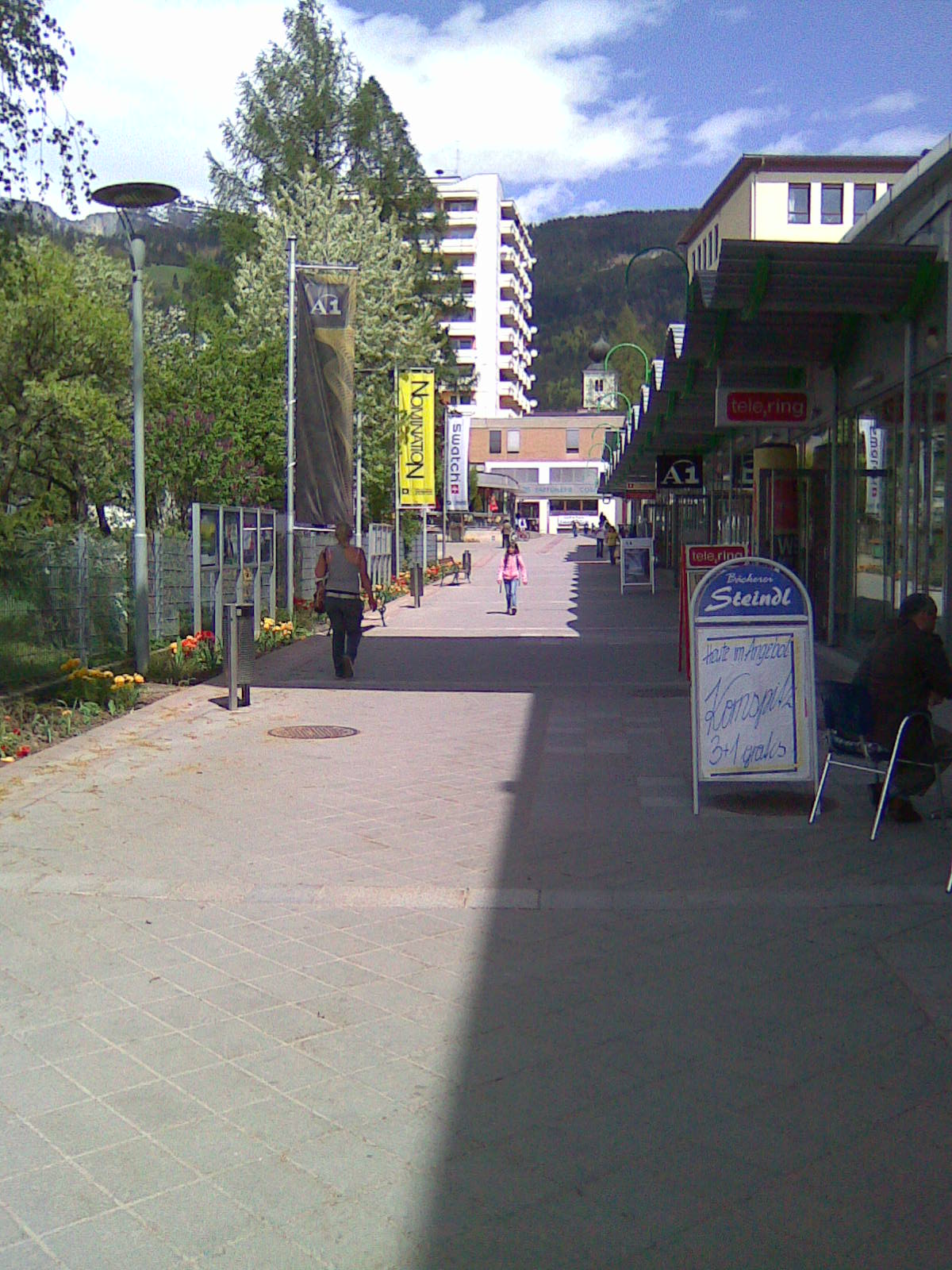 Fußgängerzohne Liezen